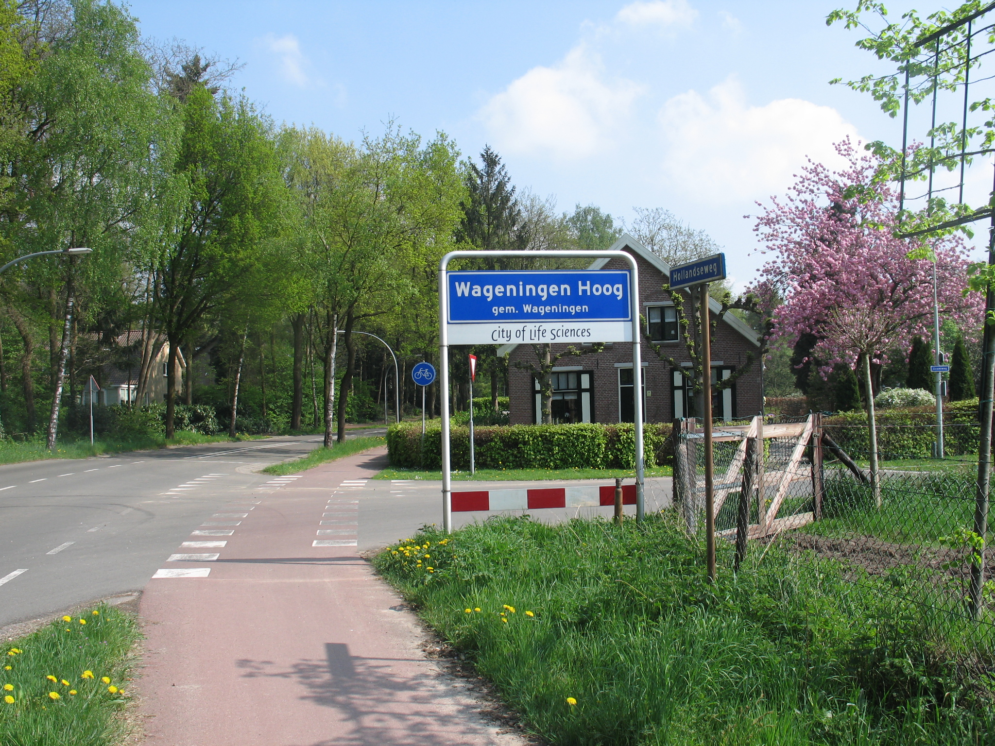 Bord wanneer men vanuit Wageningen Wageningen-Hoog binnen komt.